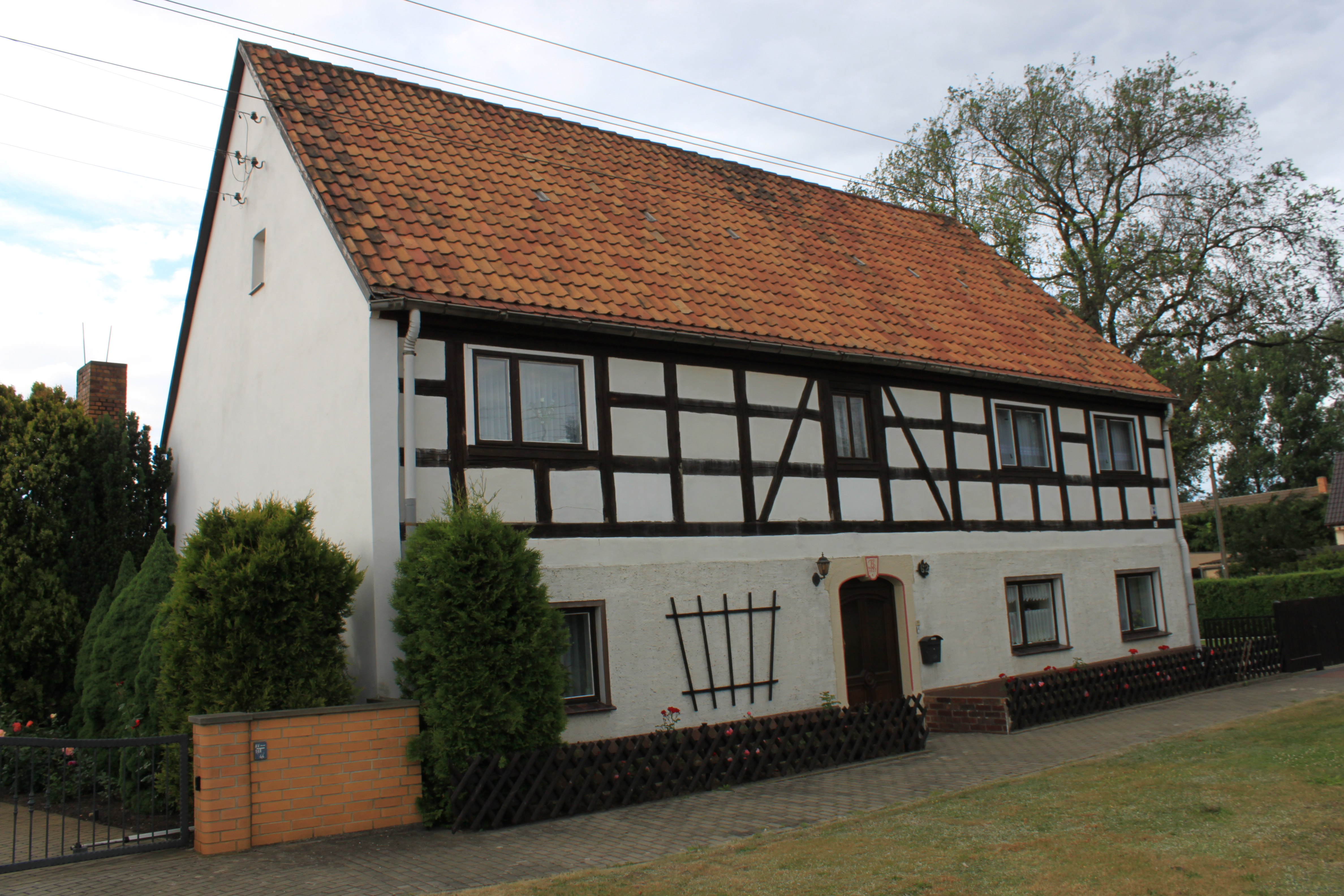 Fachwerkhaus in Prieschka